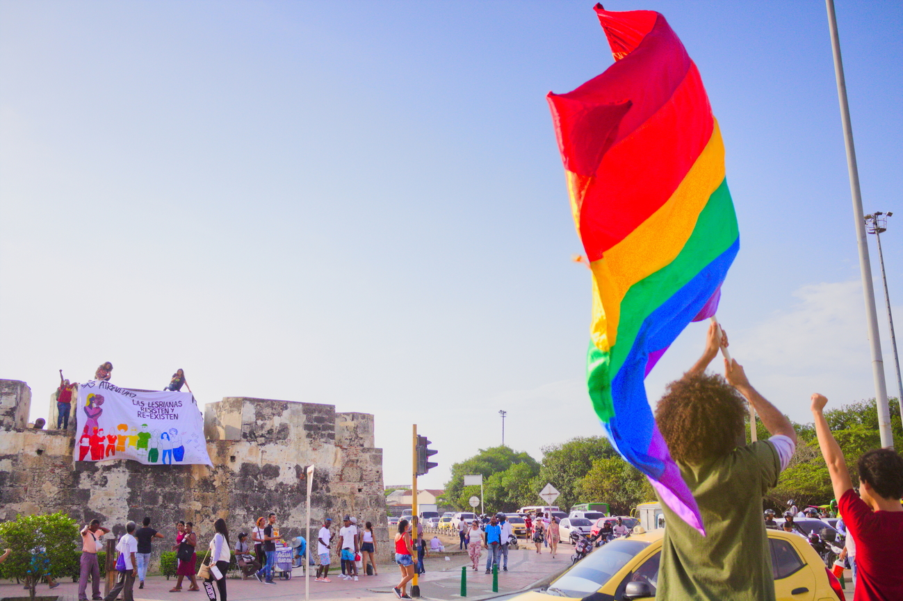 Día Internacional contra la discriminación por orientación sexual, identidad de género y su expresión.Location: Cartagena, ColombiaEvent type: Día Internacional contra la discriminación por orientación sexual, identidad de género y su expresión.Date or year: 2019